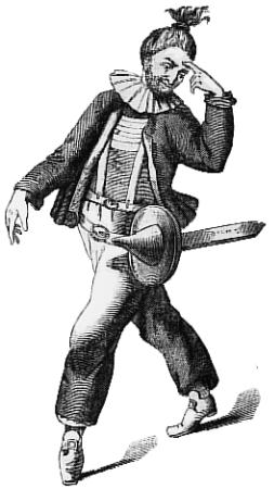 Josef Anton Stranitzky, the Viennese Hanswurst